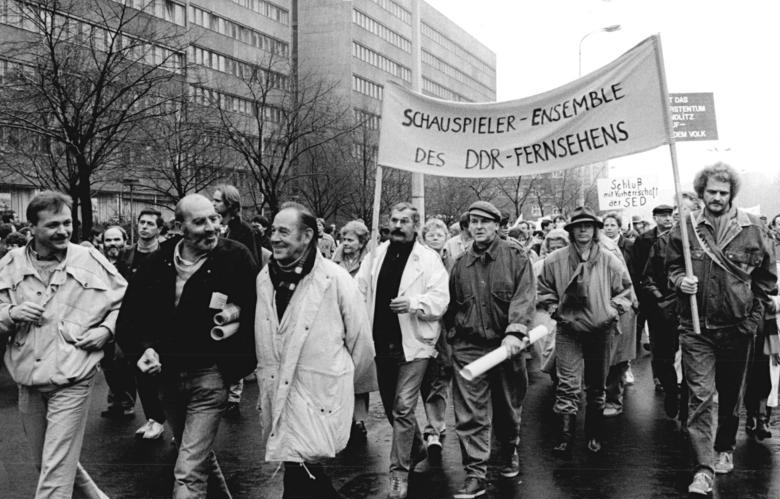 ADN-ZB Zimmermann 4.11.89. Berlin: Demonstration Hunderttausende Bürger beteiligten sich an einer Demonstration, zu der Berliner Kunst- und Kulturschaffende ins Zentrum der Hauptstadt eingeladen hatten. Unter den Teilnehmern war auch der Schauspieler Herbert Köfer.